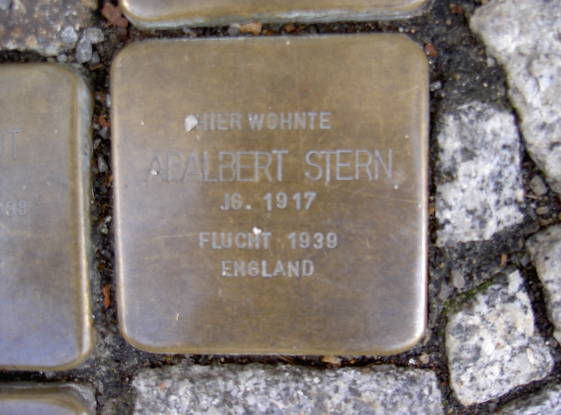 Stolperstein in Themar Markt 8 Stern Adalbert